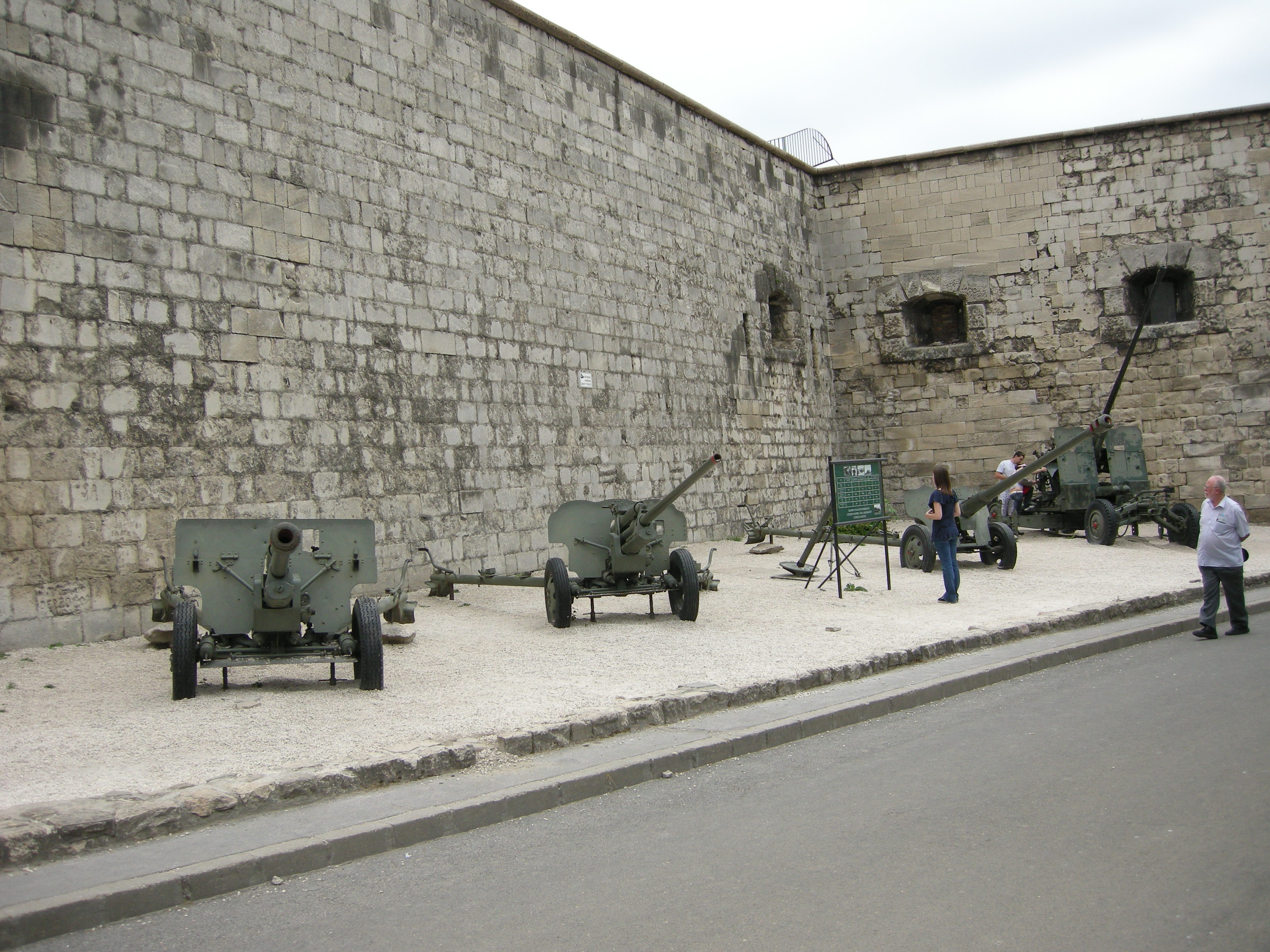 Budapest